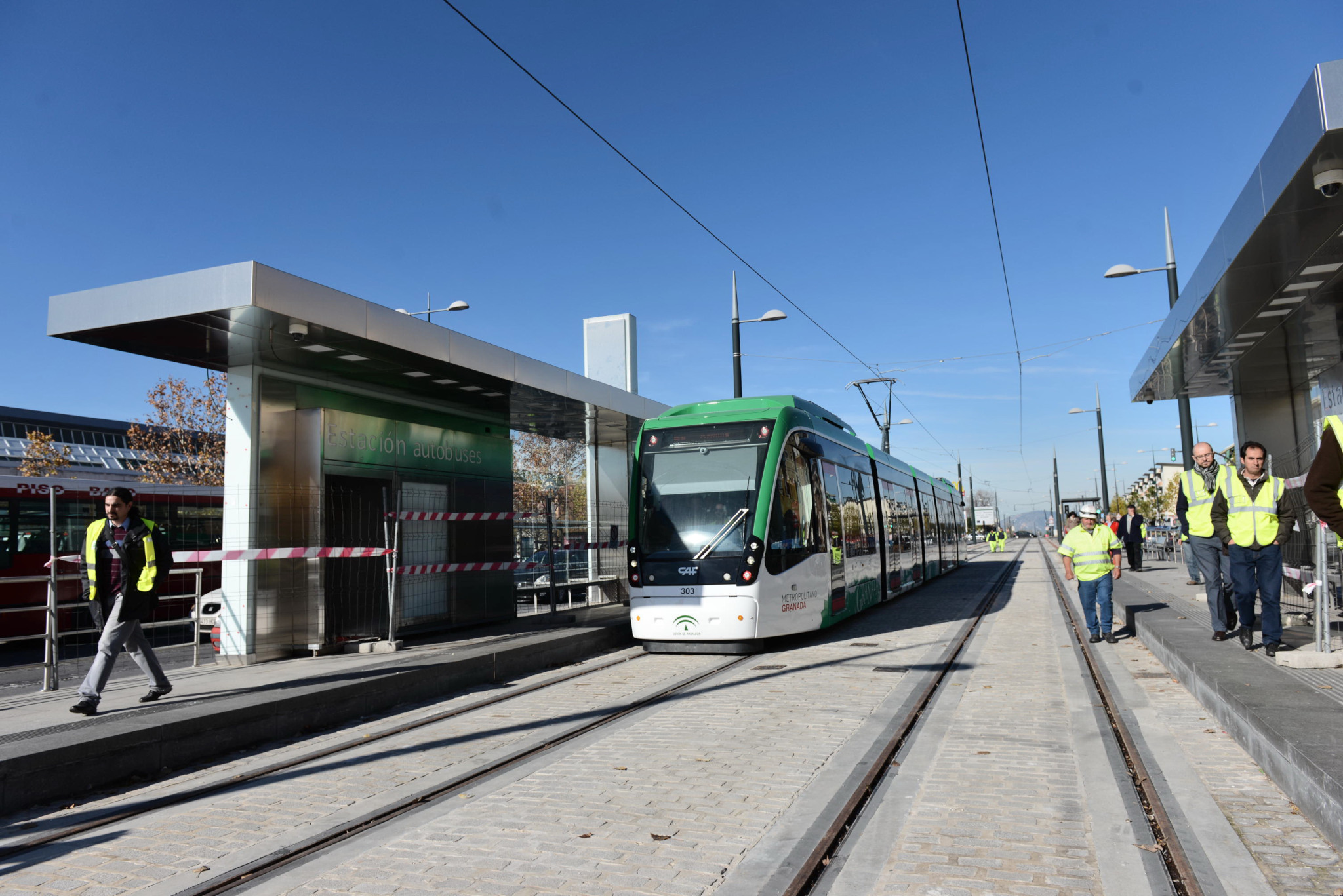 Metropolitano de Granada